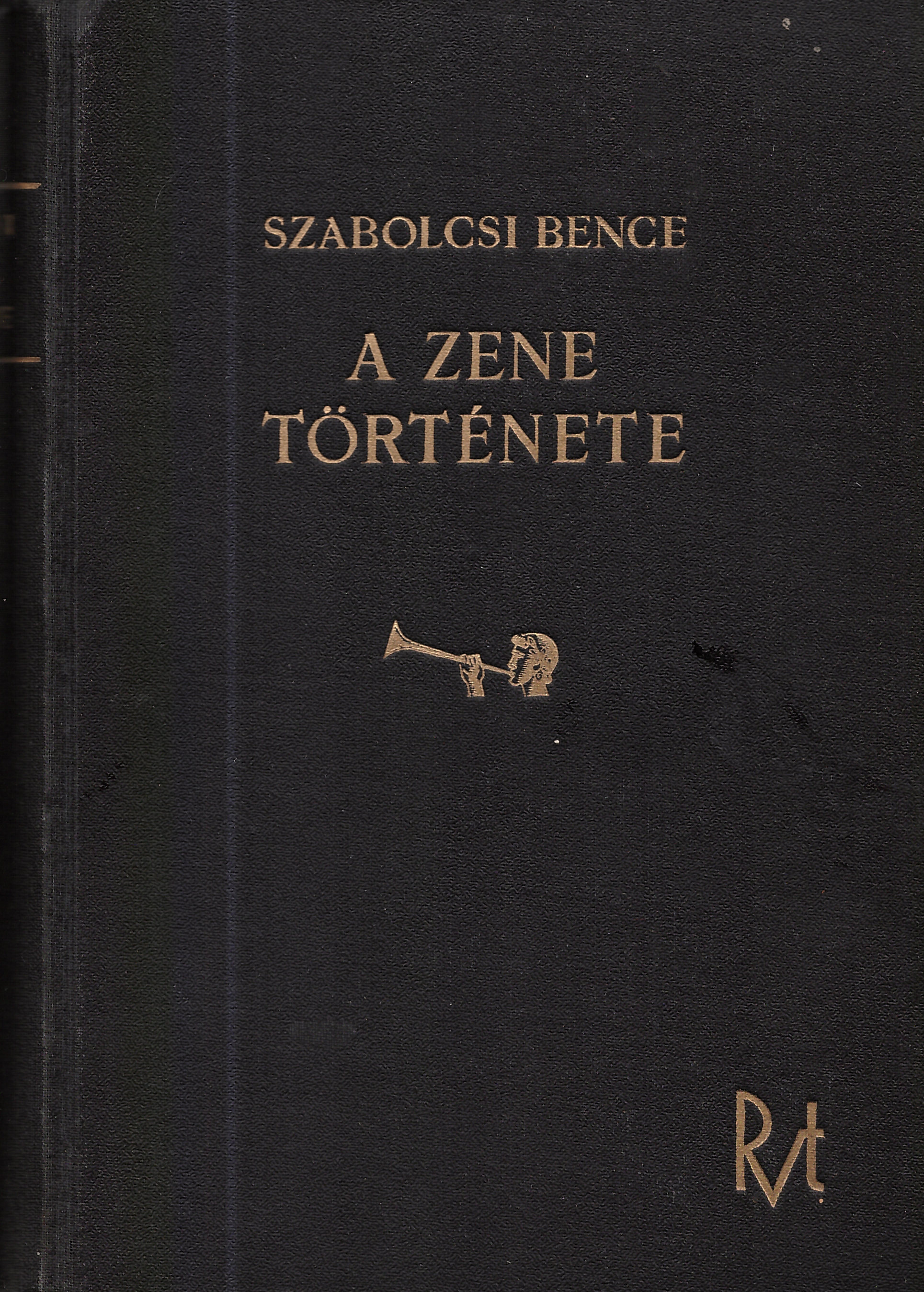 Szabolcsi Bence: A zene története, 1940, a borítódísz szerző nem ismert